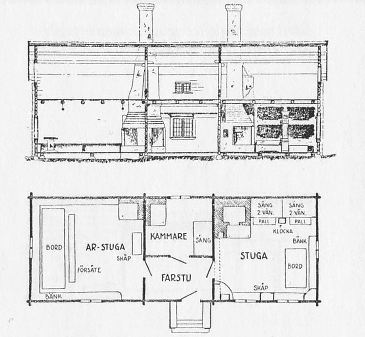 Parstuga på Gatugården Leksands sn, uppmätning plan och sektion